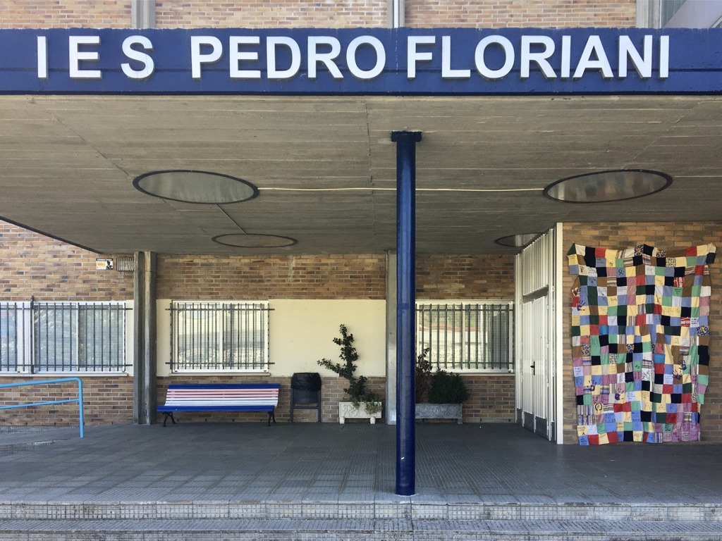 Instituto de Ensino Público